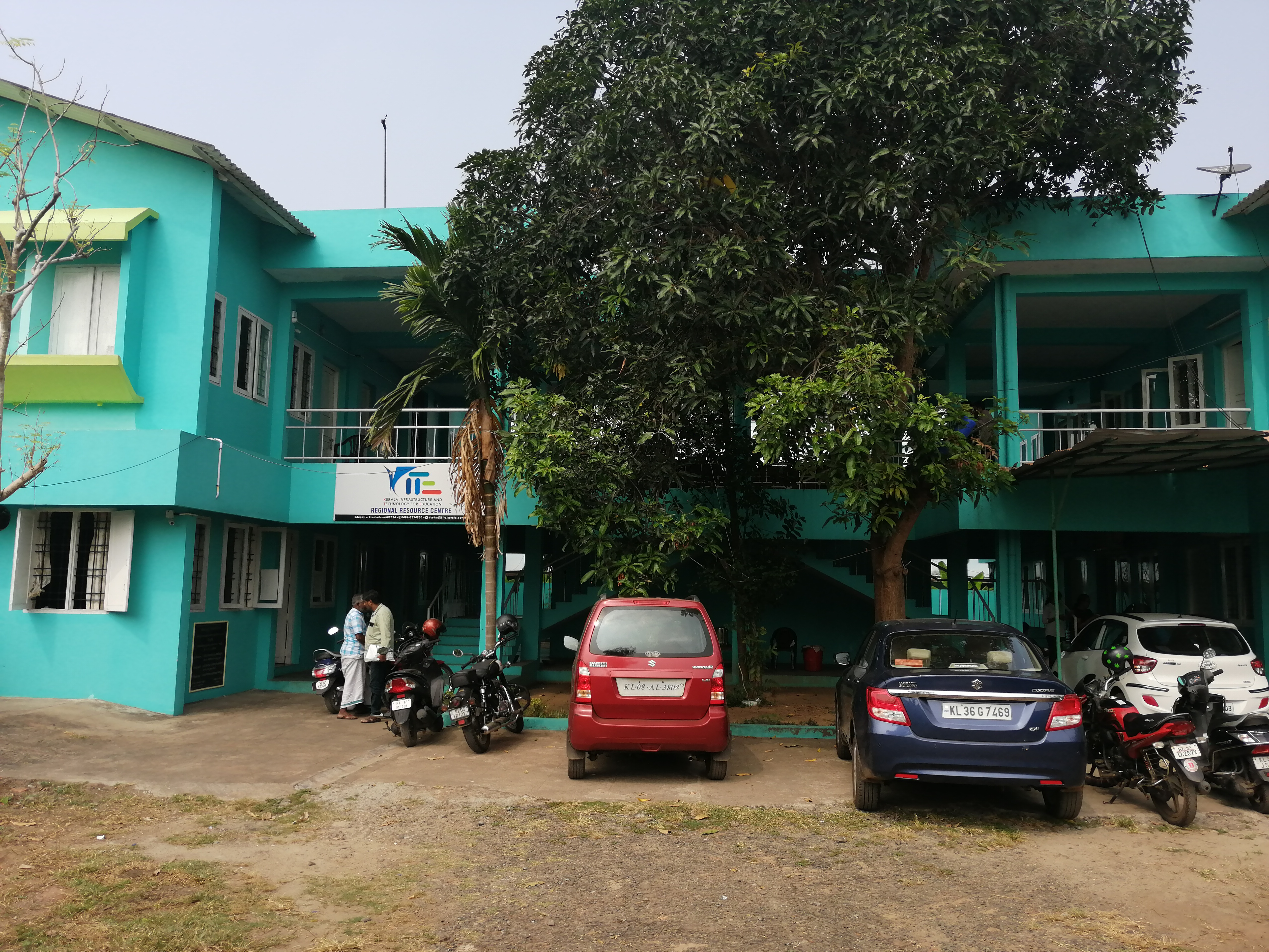 Regional Resource Centre of IT @ School Project, Kerala